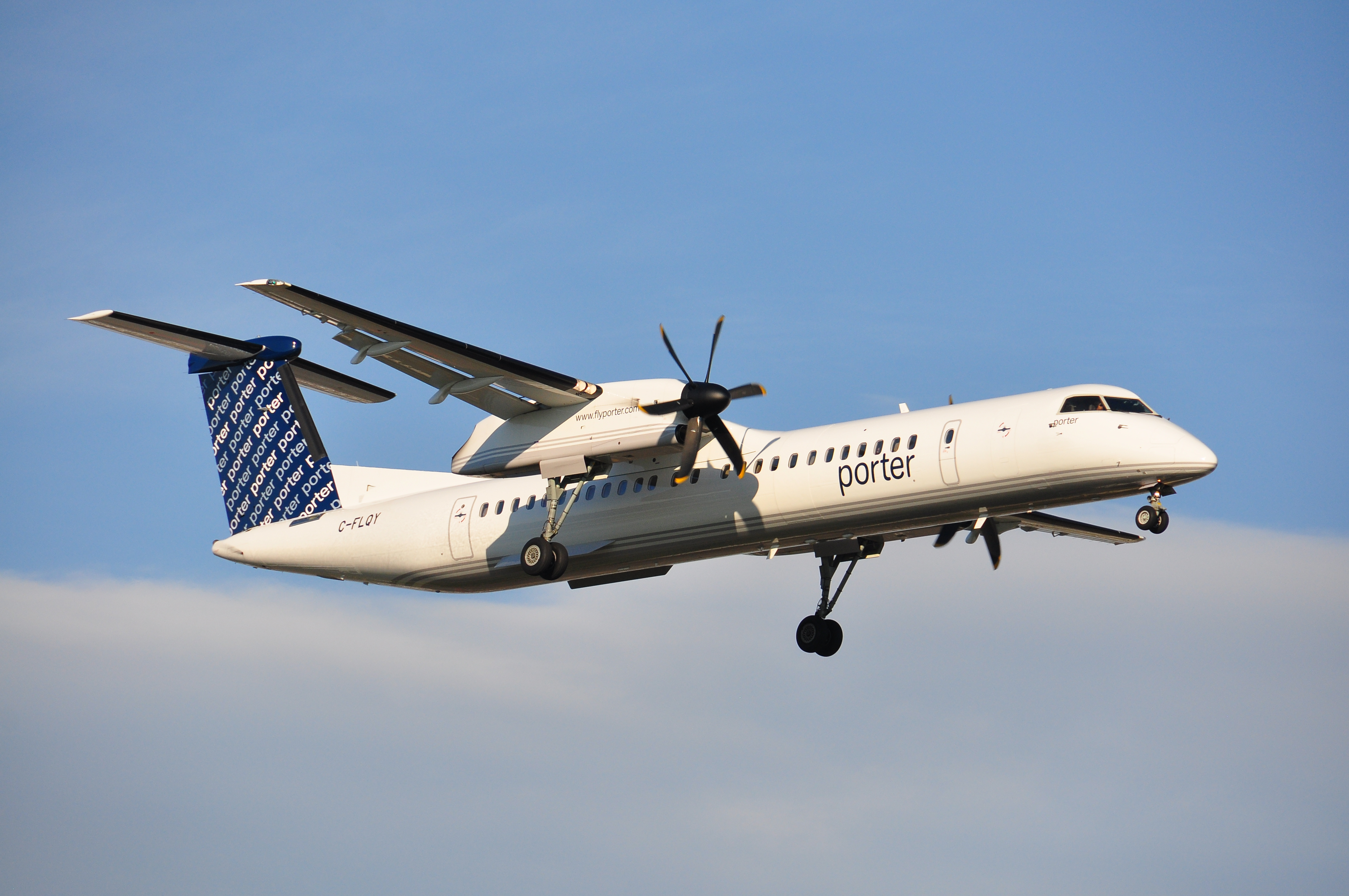 Porter Dash 8 Q-400 C-FLQY